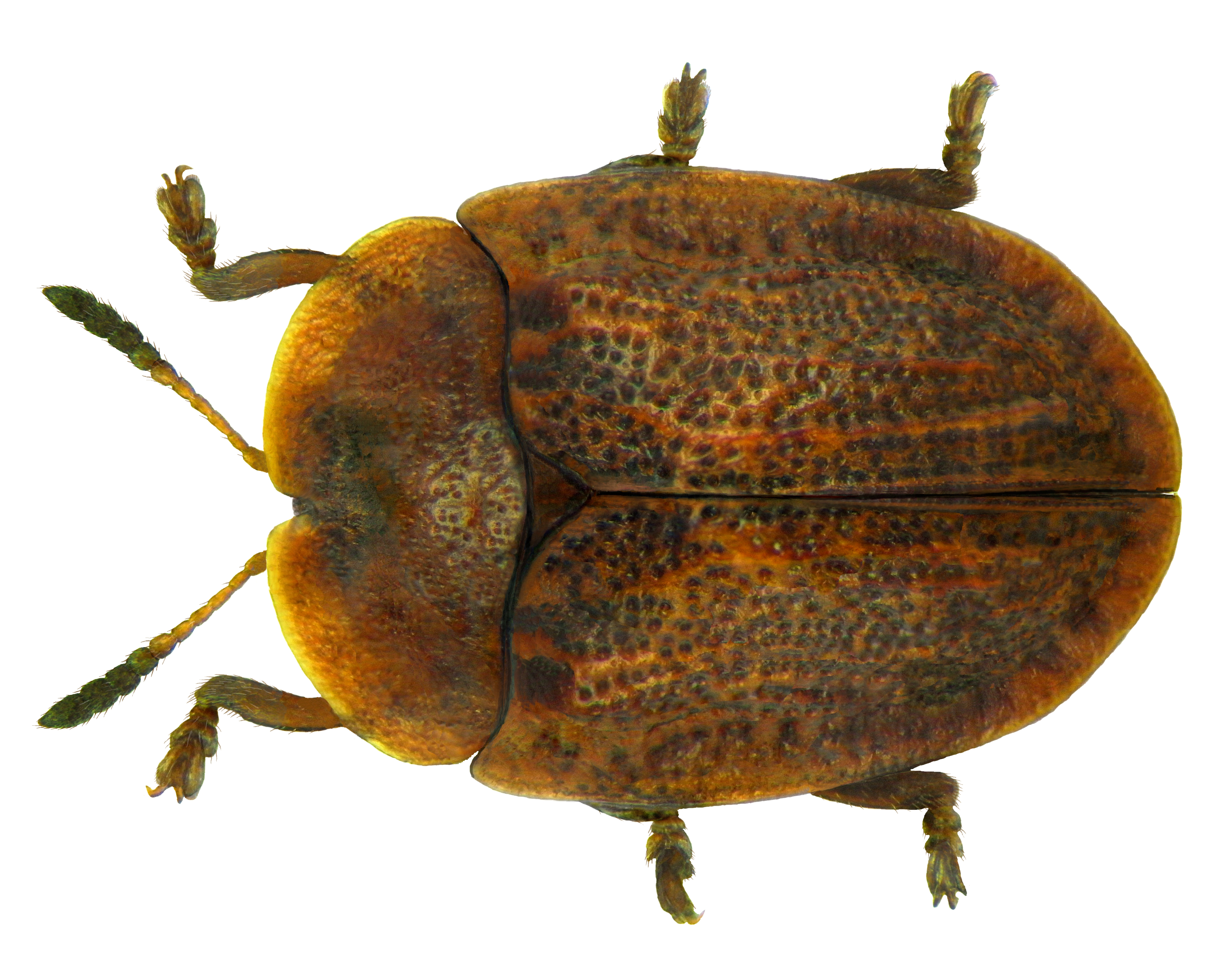 Hypocassida subferruginea (Schrank, 1776) Familie: Chrysomelidae Groesse: 4,5-6,0 mm Verbreitung: Süd-Mitteleuropa Oekologie: an Convolvulus-Arten Fundort: Germania, Bayern, Oberfranken, Kulmbach leg.det. U.Schmidt, 3.XI.1977 Photo: U.Schmidt, 2011